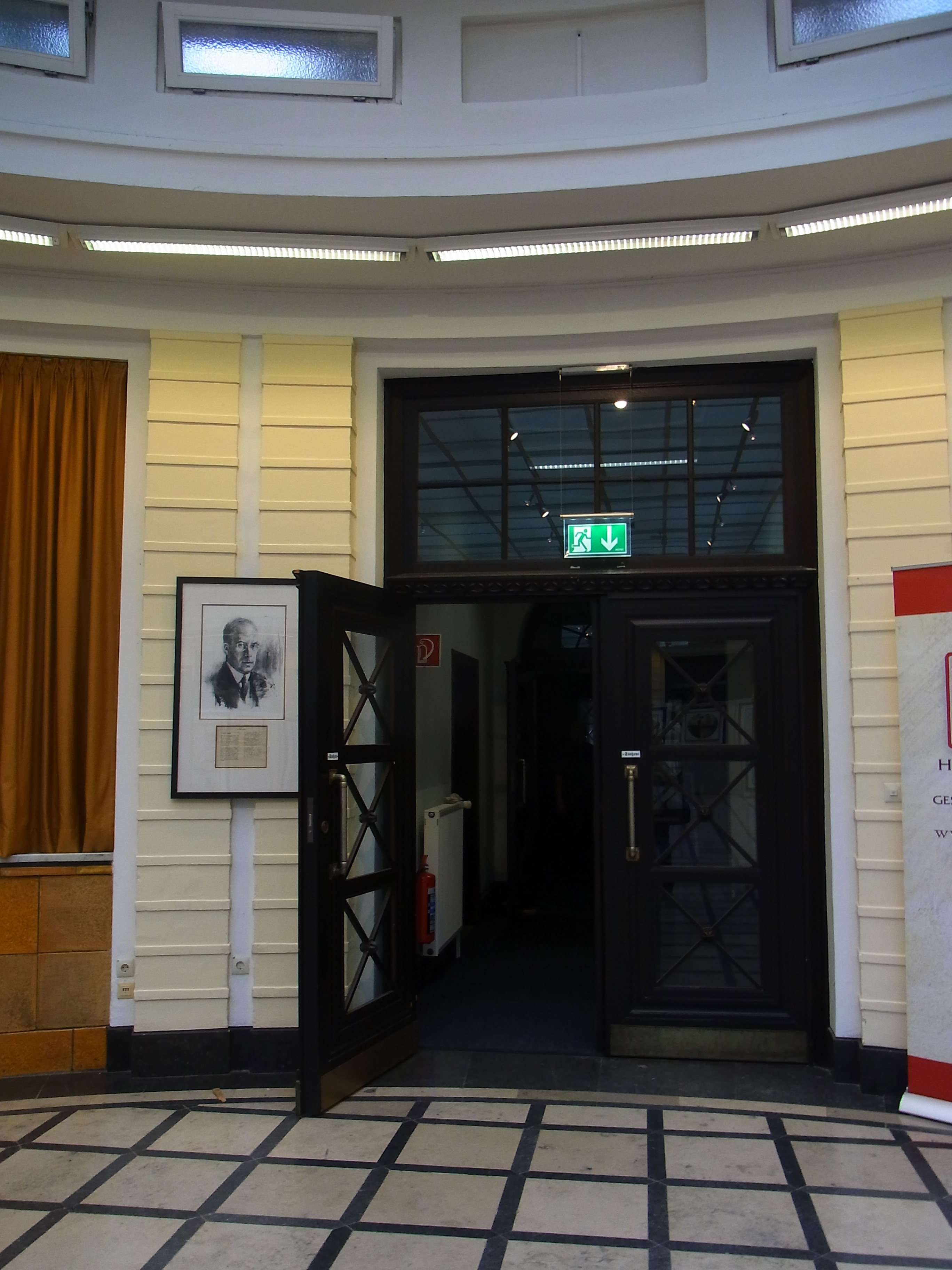 Neben dem Eingang in den Lippmann-Saal, der ehem. Kassenhalle der Finanzbehörde, hängt ein Bildnis von Leo Lippmann